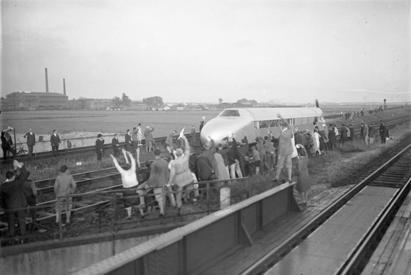 Der Schienenzeppelin, der Propellerwagen des deutschen Ing. Krukenberg, rast mit 230 km Stundengeschwindigkeit von Hamburg nach Berlin. Mit 230 km Stundengeschwindigkeit rast der Schienenzeppelin, stürmisch bejubelt kurz hinter Staaken am 21. Juni, 5 Uhr morgens, seinem Ziele dem Hauptbahnhof in Spandau zu.